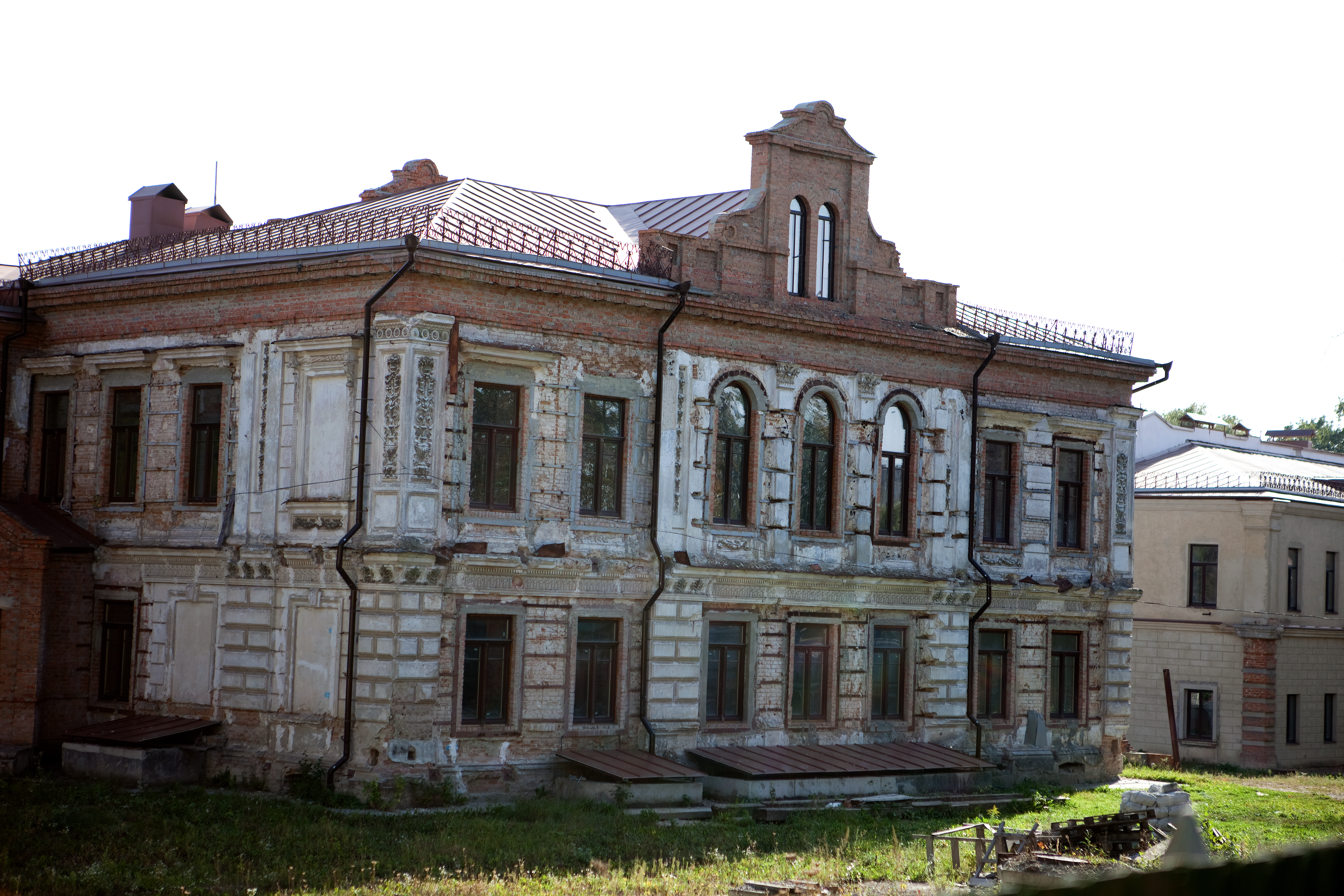 Сумська область, Сумський район, місто Суми, вул. Троїцька, 4, Комплекс садиби Харитоненка (мур.)